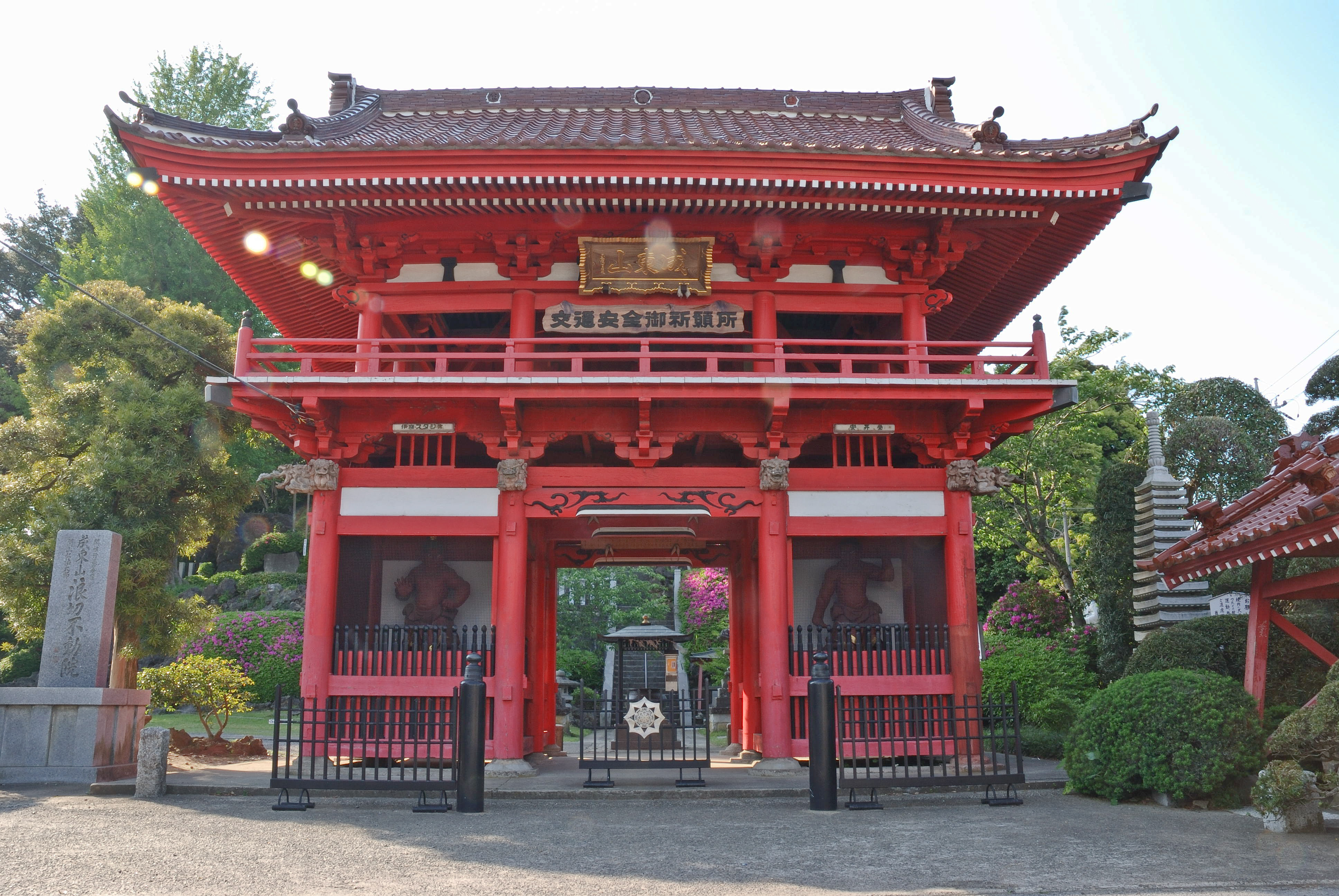 Niomon